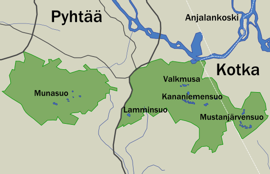 Valkmusa Parke Nazionalaren mapa